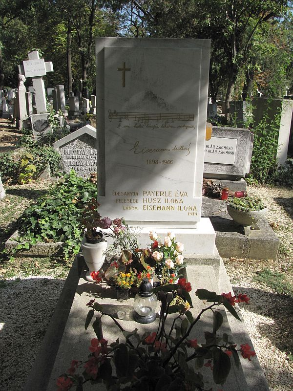 Eisemann Mihály (ered. Egresi Mihály, Paripás, 1898. június 19. – Budapest, 1966. február 15.) magyar zeneszerző, karmester sírja Budapesten. Farkasréti temető: 33/3-2-32